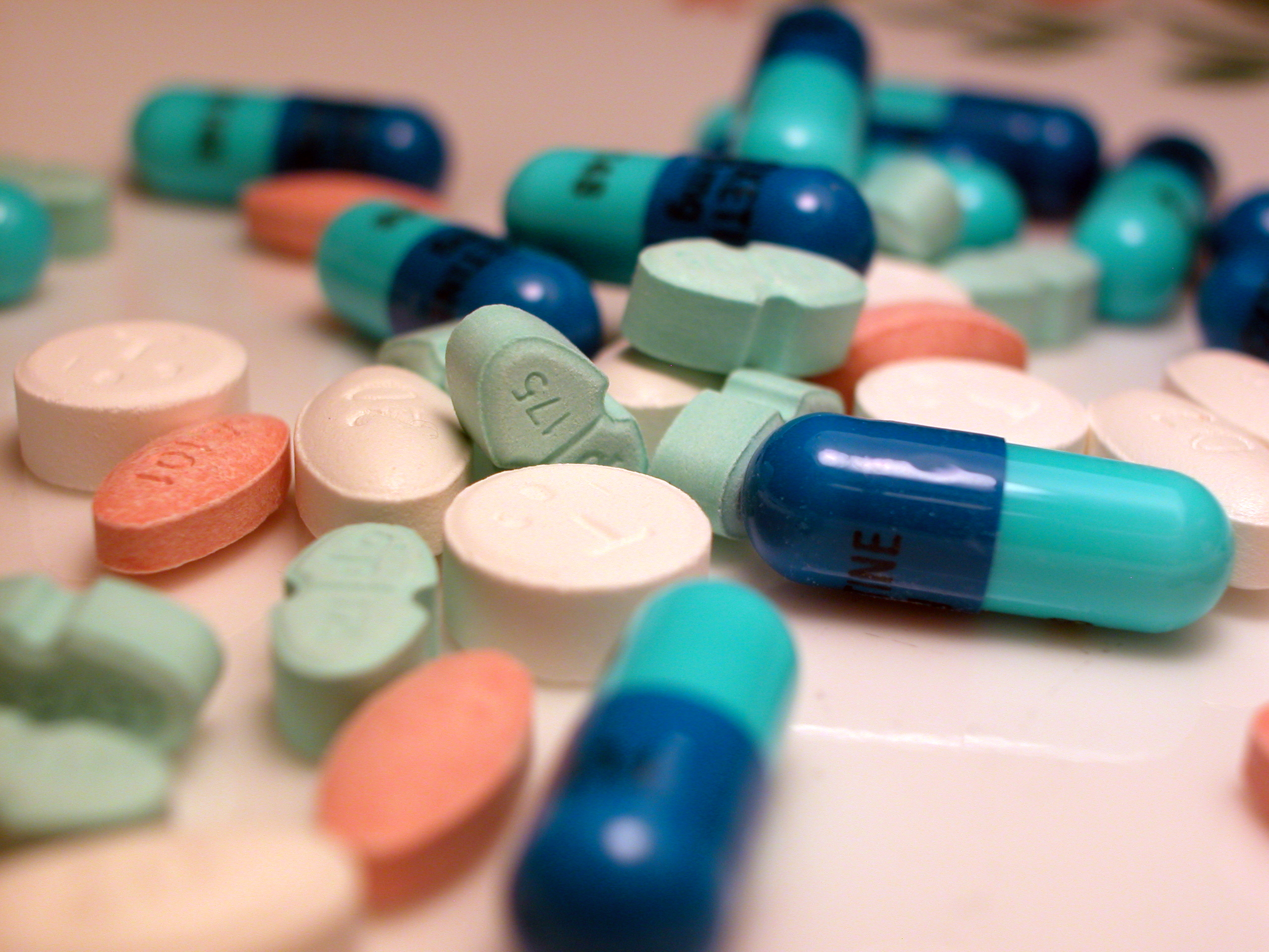 Various pills